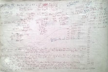 Comment Petain